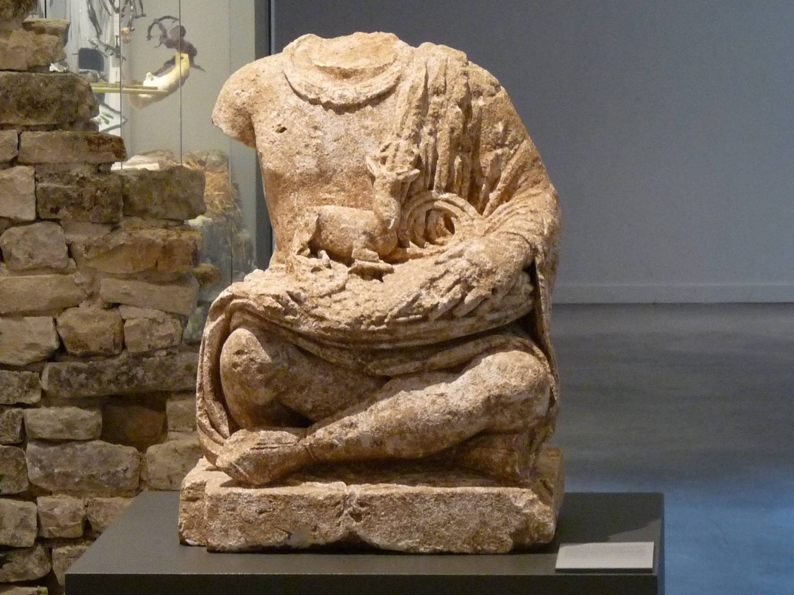 dieu gallo-romain assis de Verteuil, musée des Beaux-Arts d'Angoulême, France